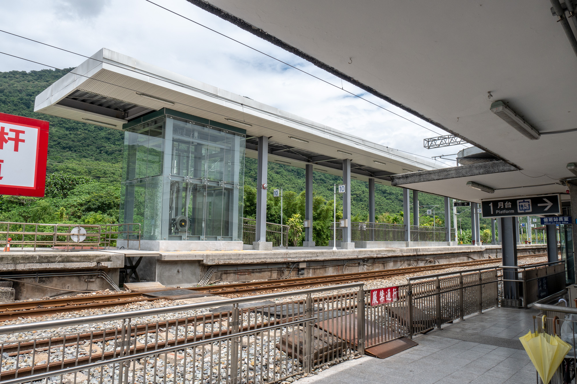 臺灣鐵路管理局志學車站2018年改建後月台，新增一座月台電梯。